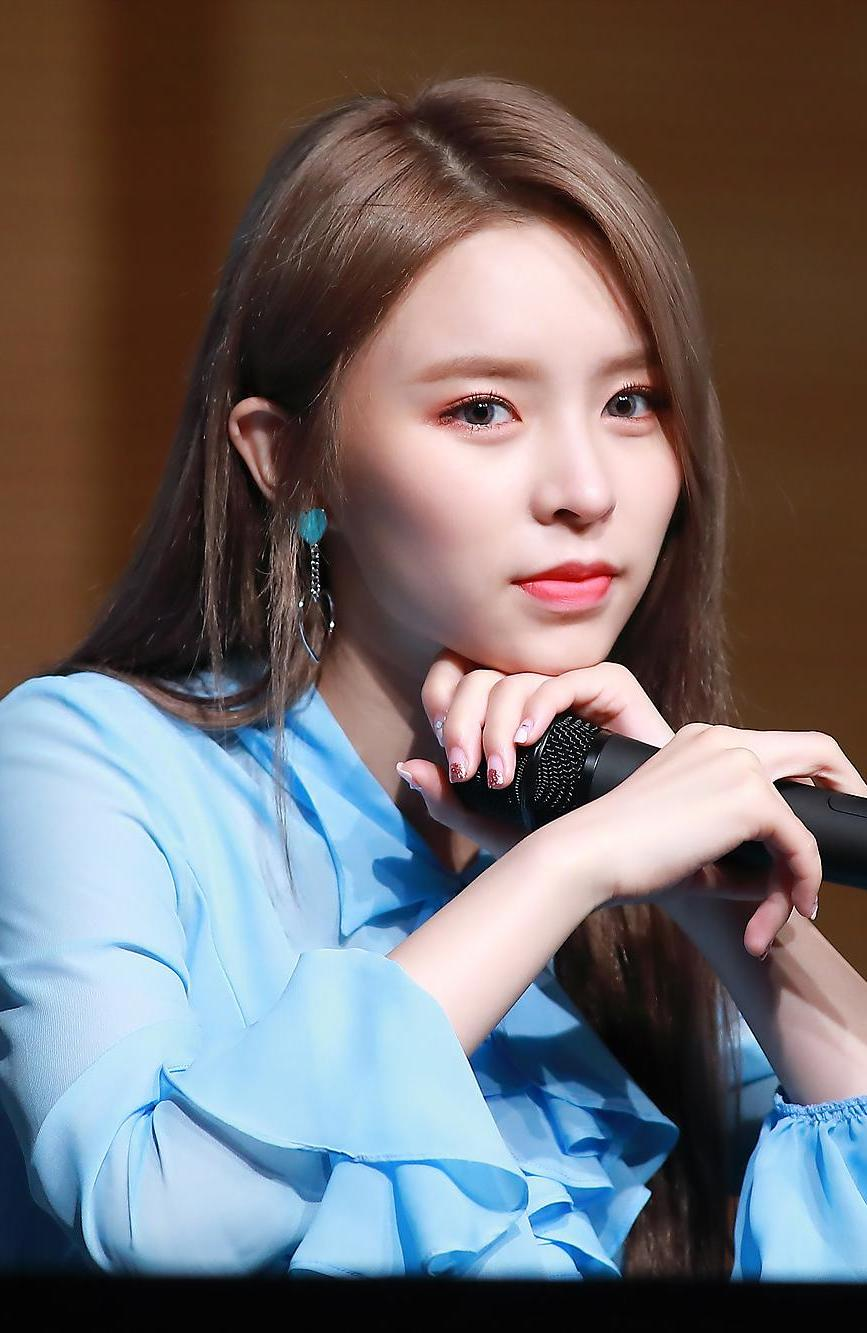 170813 CLC 동서울아트홀 팬사인회